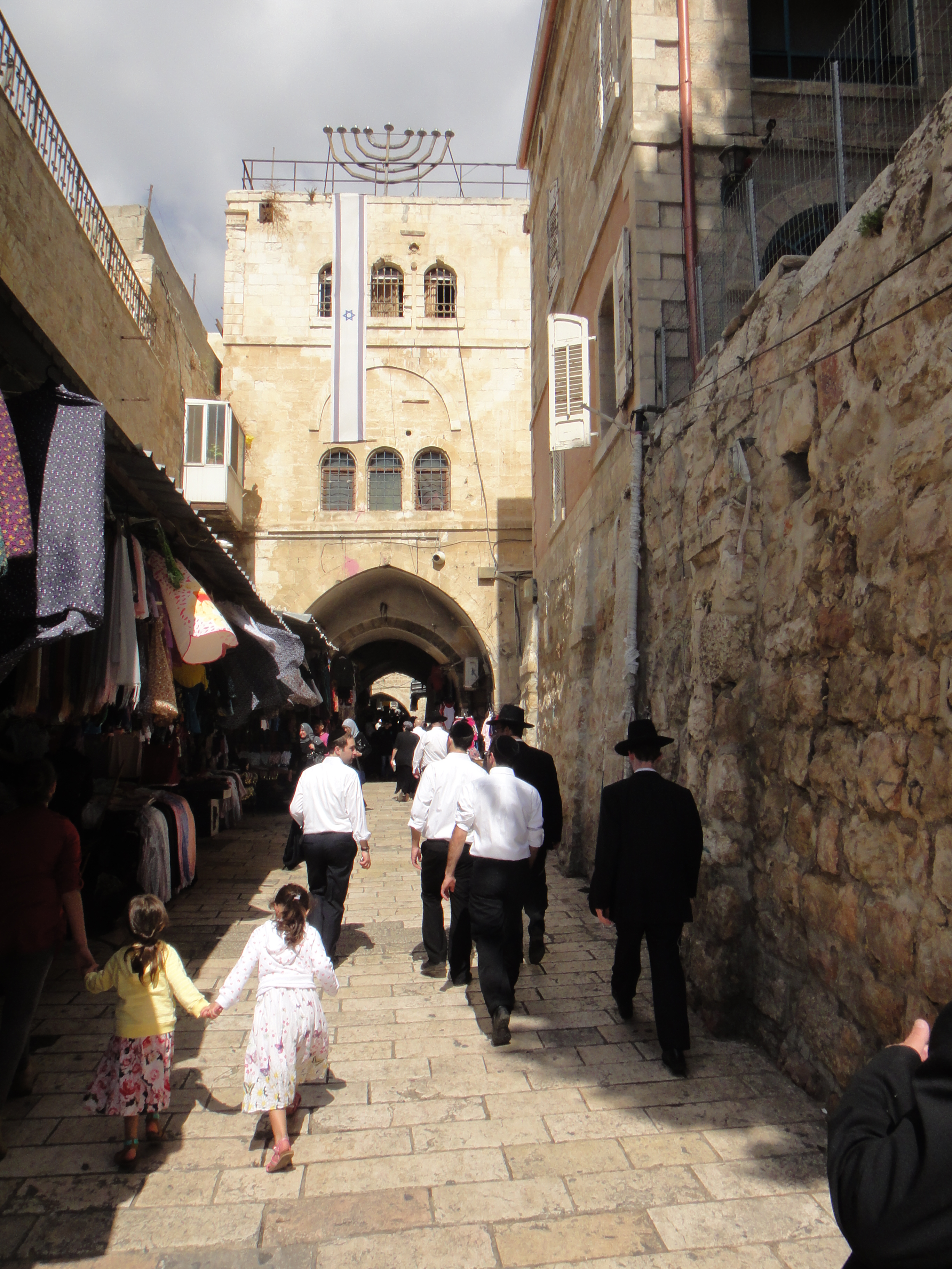 בית ויטנברג